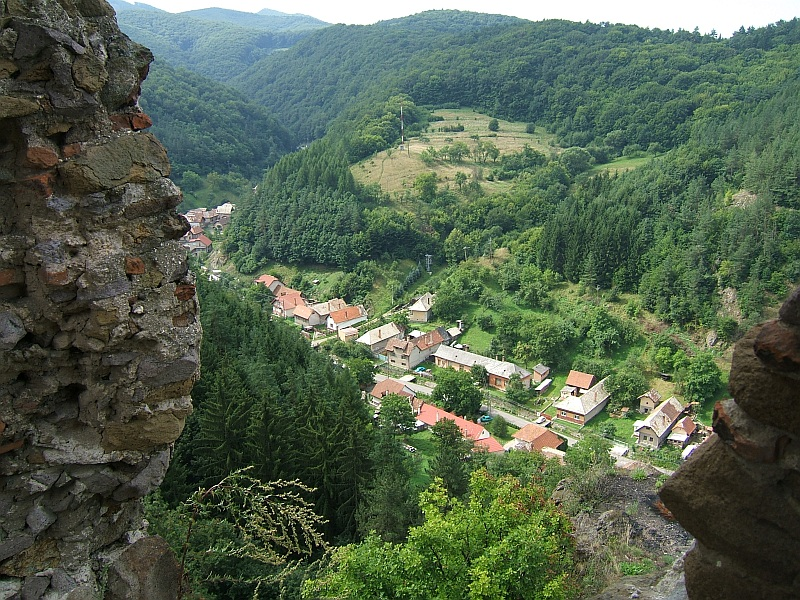 Šášovské podhradie_from window2